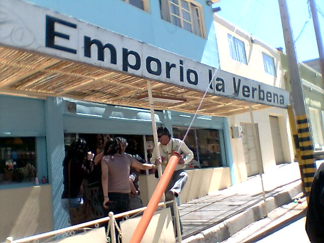 Xhuquicamat el dia de su despedida